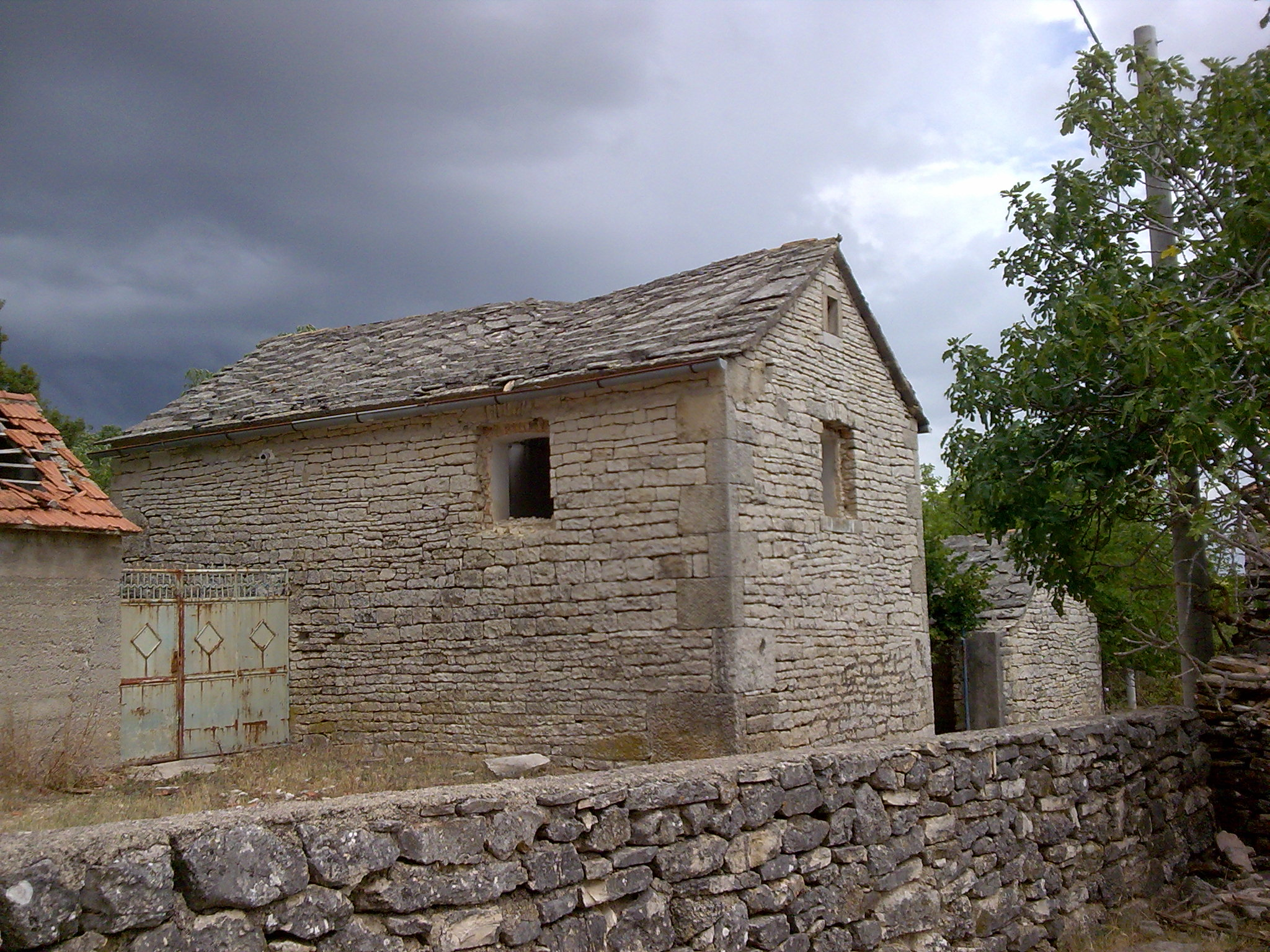 Bjelina